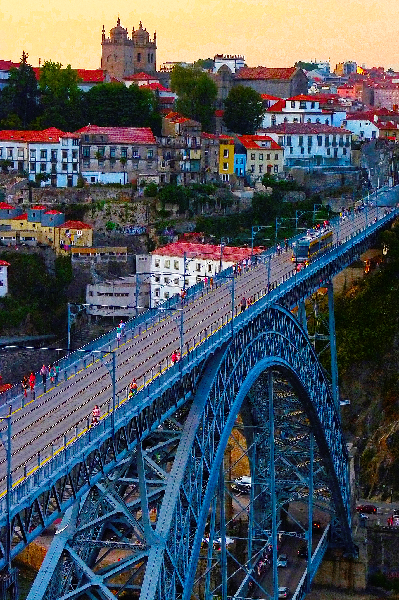 Ponte Luís I